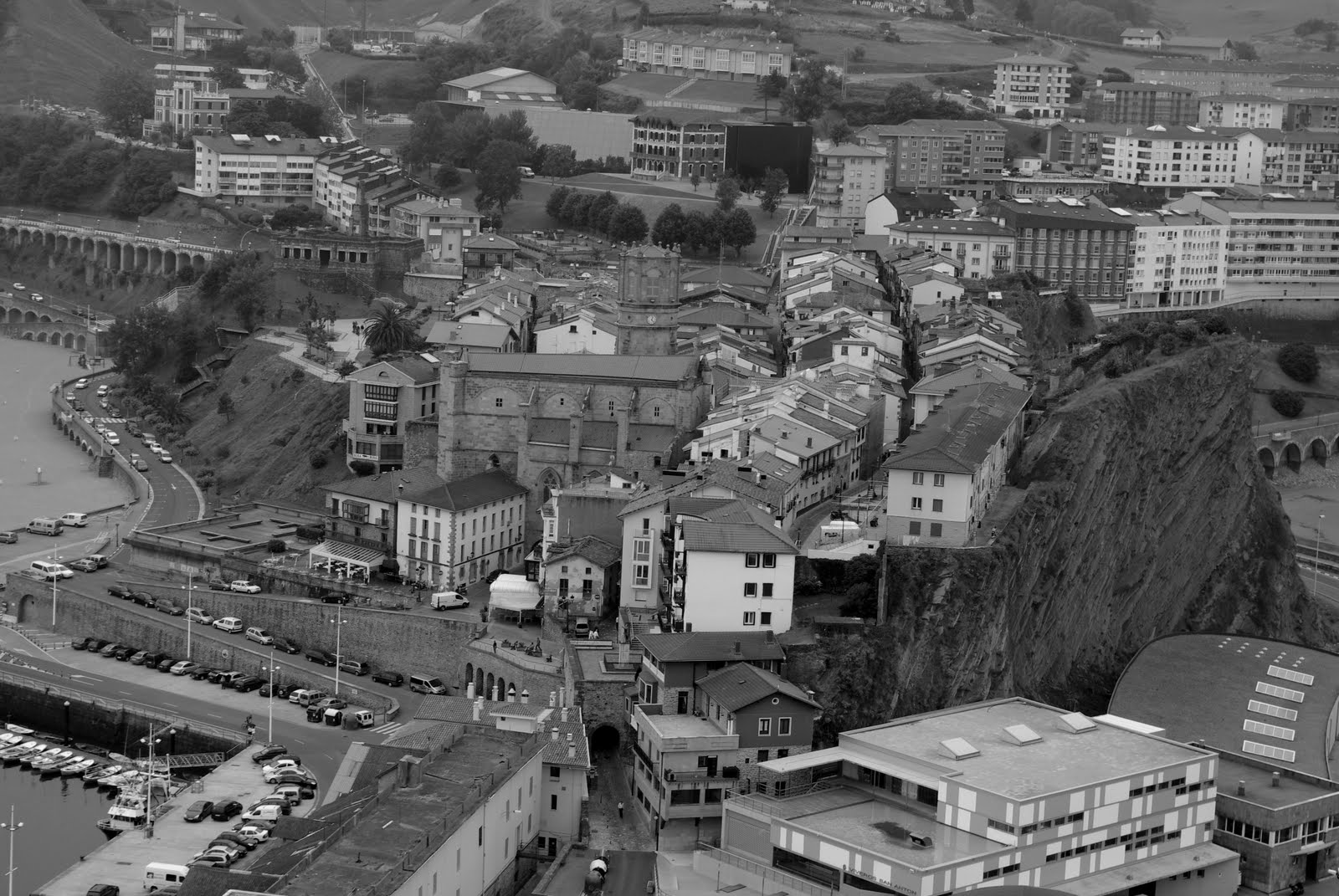 Getaria